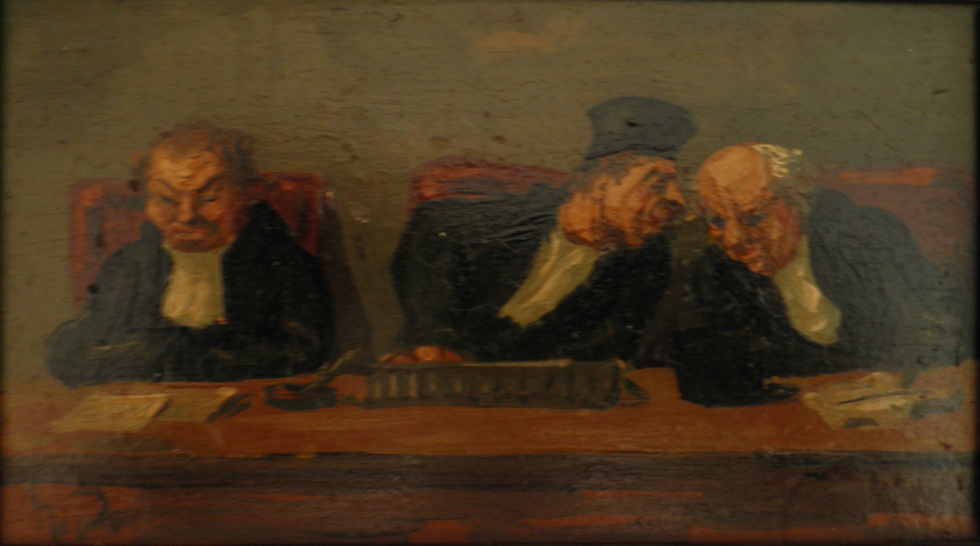 Honoré Daumier "Trois juges en séance". Huile sur bois (10,5 x 15 cm) peut-être de Daumier. Monogramme en bas à gauche.